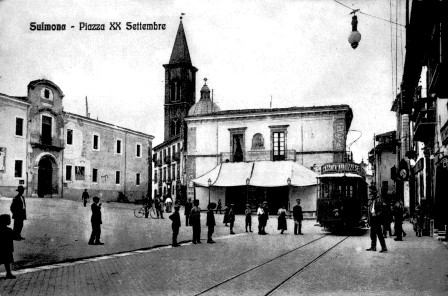 Sulmona - Piazza XX Settembre con tram